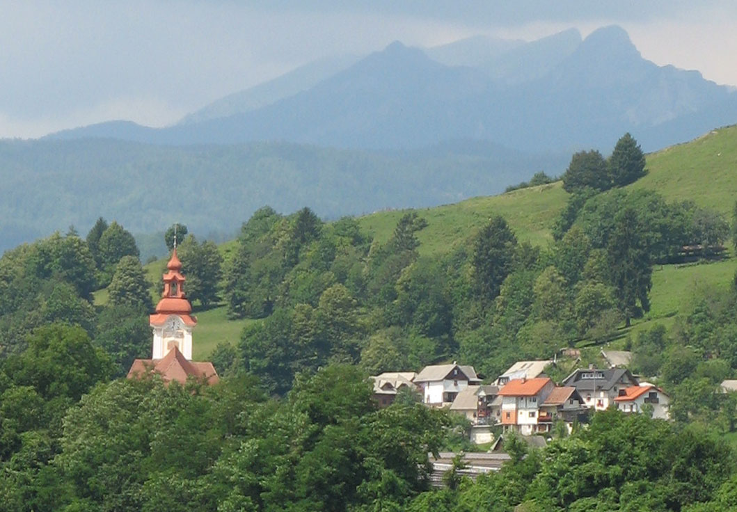 Pohled na vesnici Zasip, Slovinsko